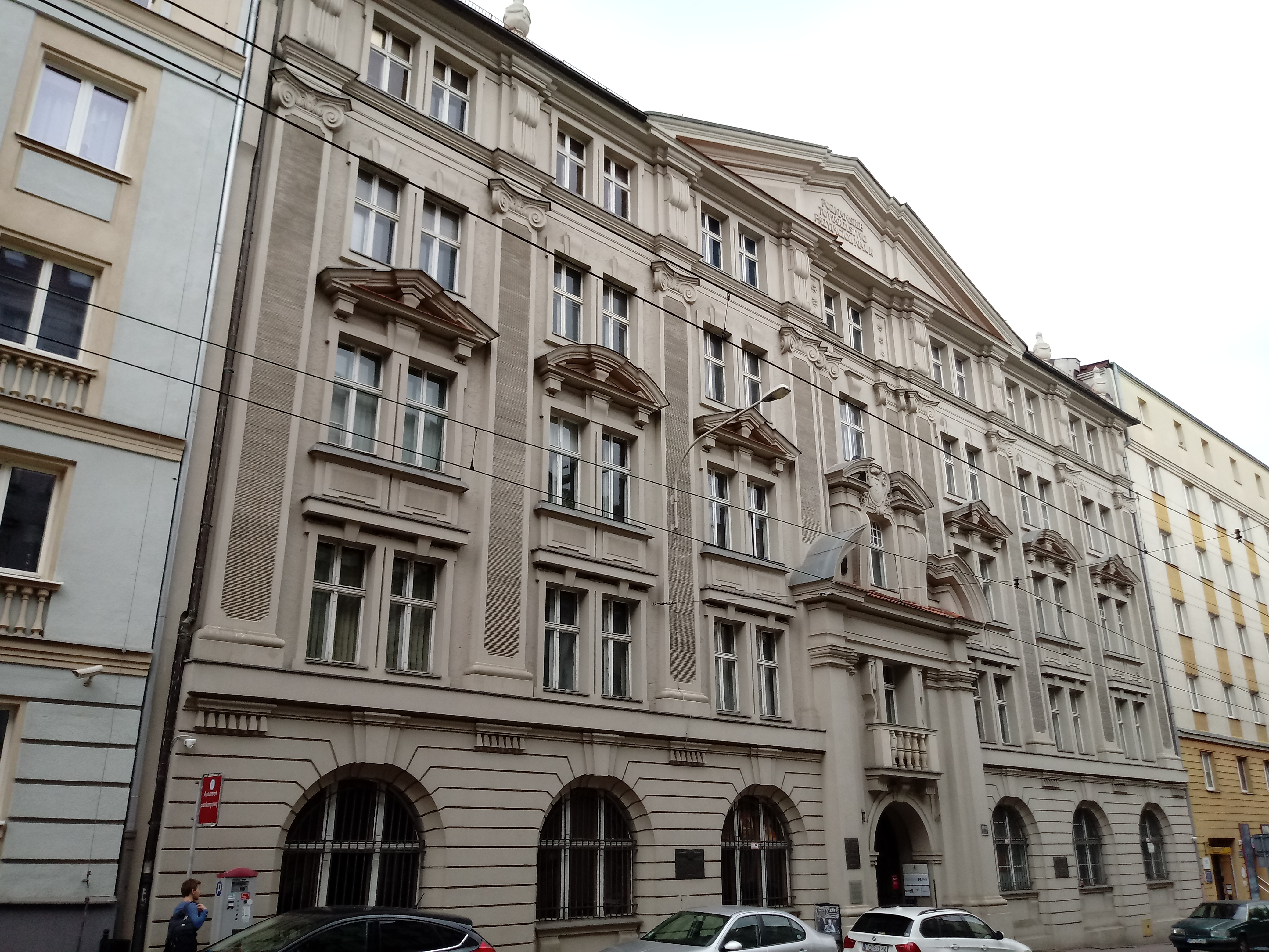 Siedziba Poznańskiego Towarzystwa Przyjaciół Nauk przy ul. Seweryna Mielżyńskiego w Poznaniu